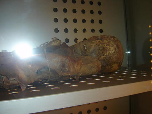 Momia de San Andrés